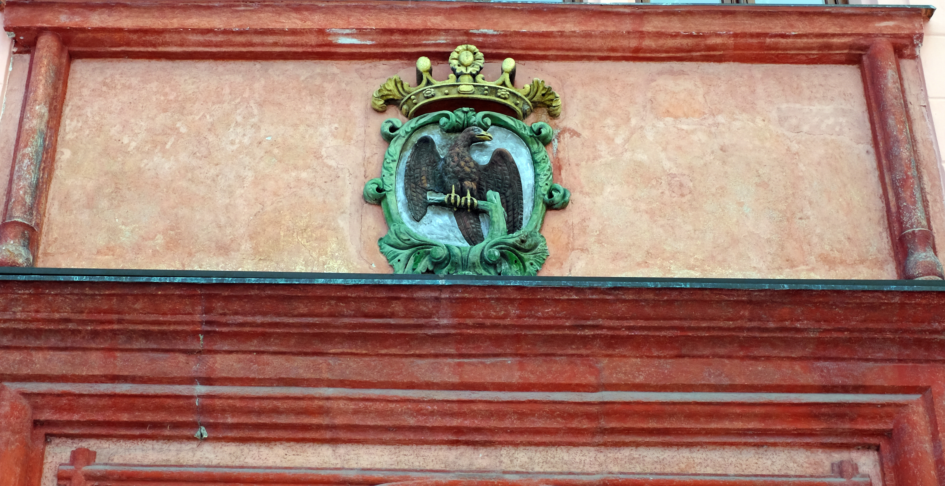 Stará radnice, Sokolov